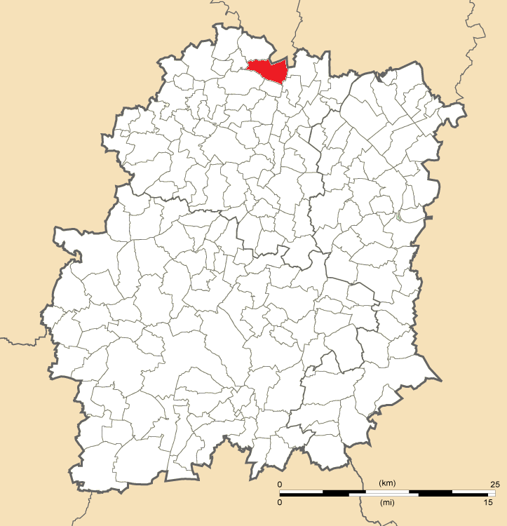 Carte de position de Massy en Essonne